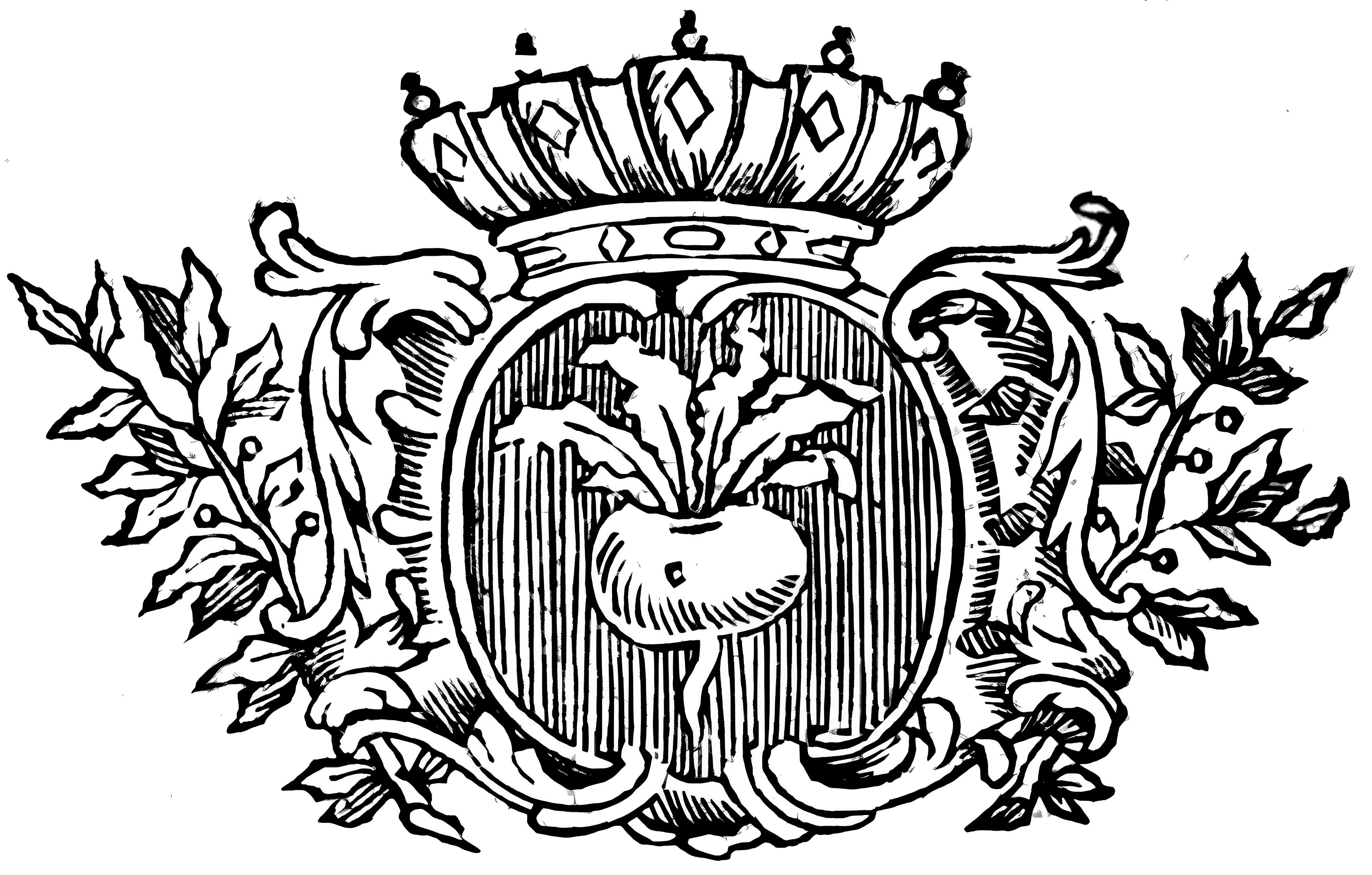 Wapen van waes